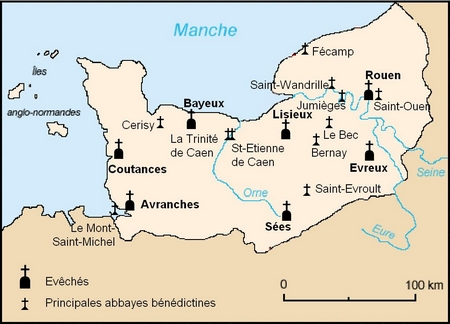 Carte du duché de Normandie. Ses évêchés et ses principaux monastères au XIe siècles